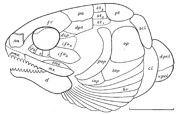 Sinamia huananensis Suo Restoration of head in lateral view. Scale bar is 8 mm